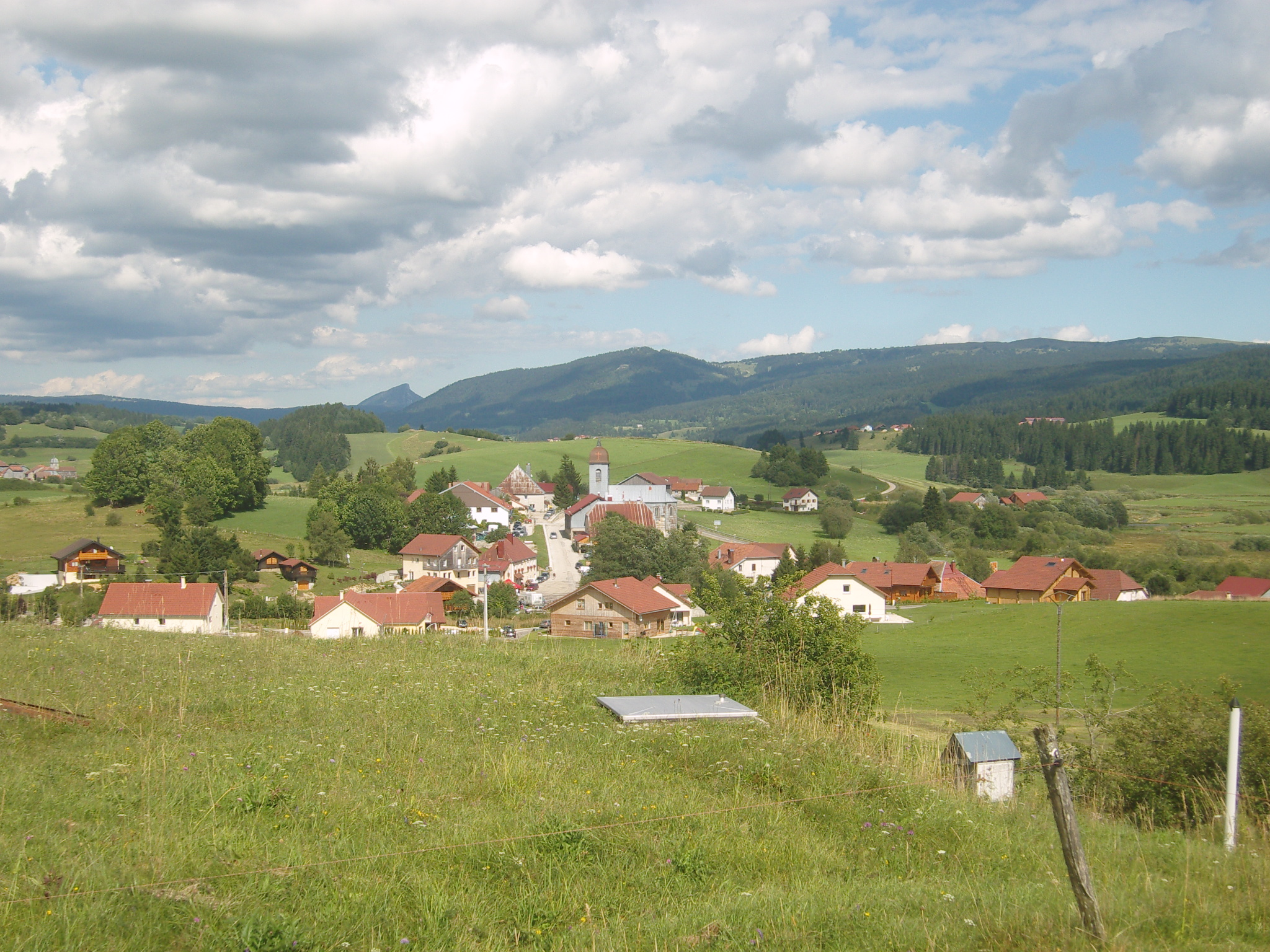 Gellin, vue générale